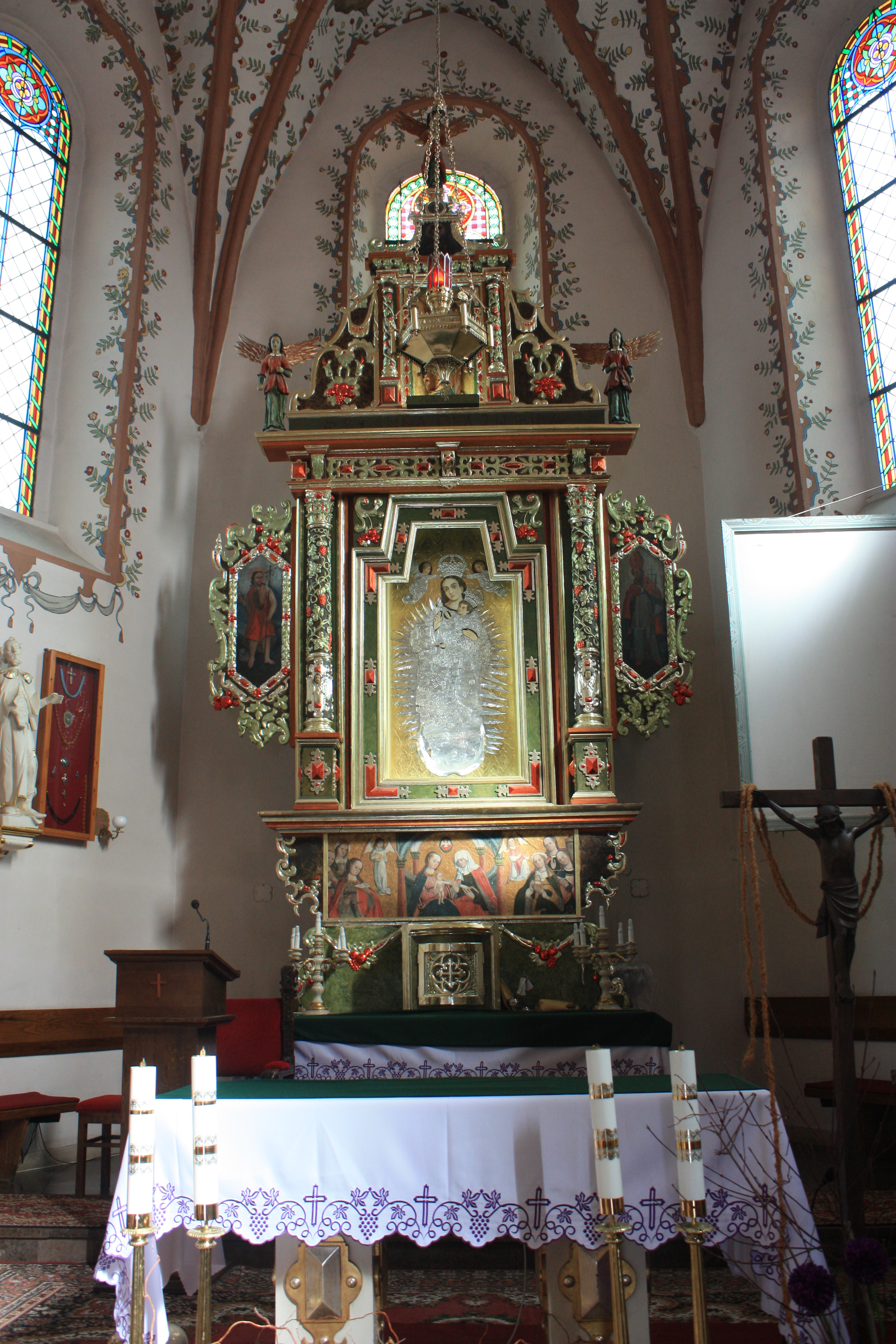 Kościół Narodzenia NMP w Kaźmierzu. Ołtarz główny.